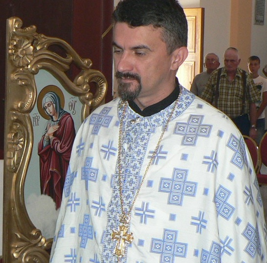 Srpskohrvatski / српскохрватски: Предраг Азап свештеник је Српске православне цркве, писац, издавач и активистa за права националних мањина у Хрватској.